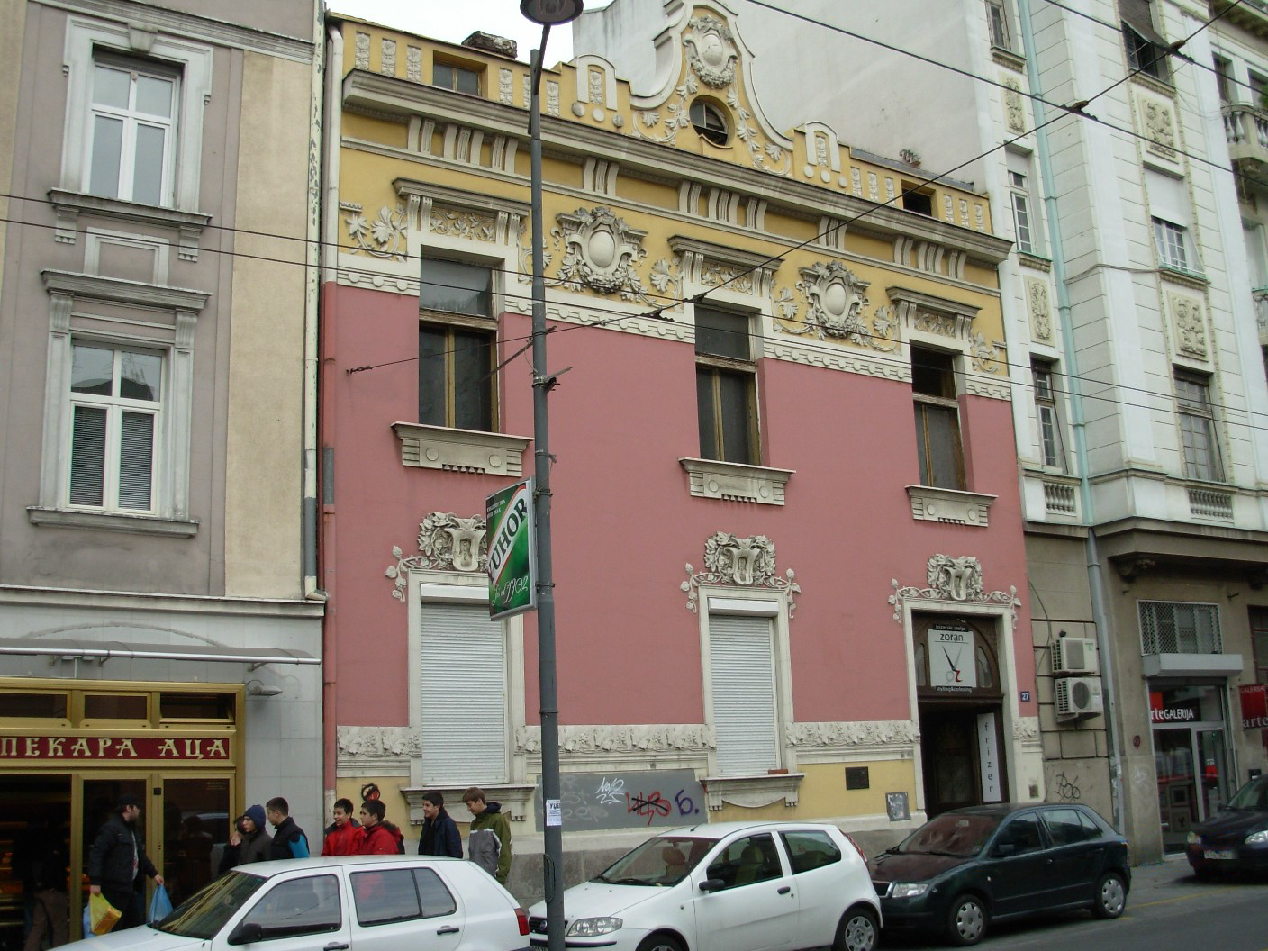 Kuća, u Beogradu, Svetogorska ulica, u kojoj je živeo i radio Uroš Predić. Autor Goldfinger